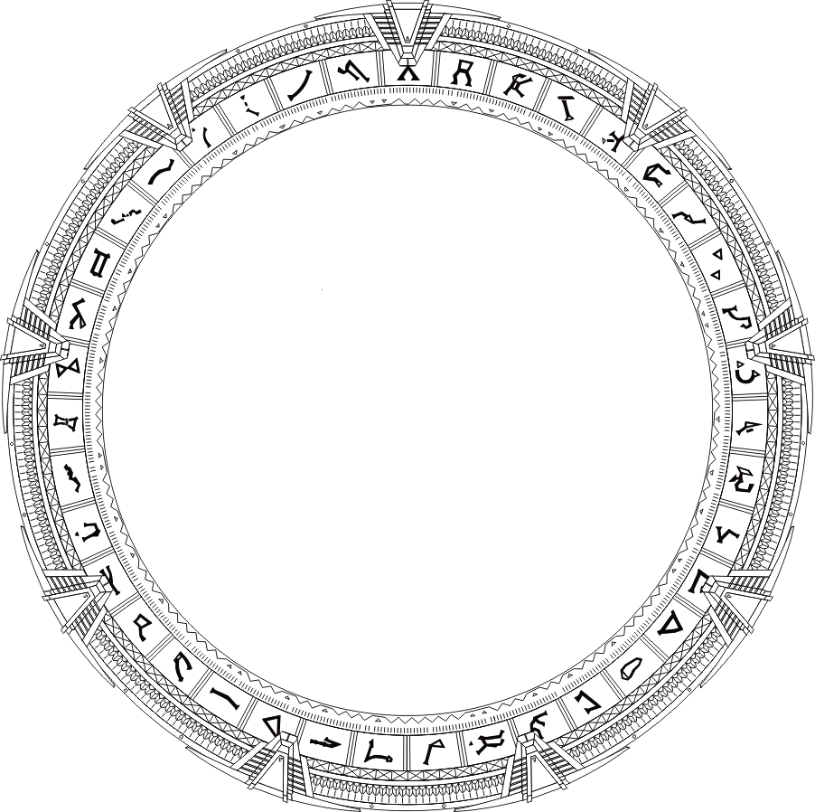 Milky Way stargate